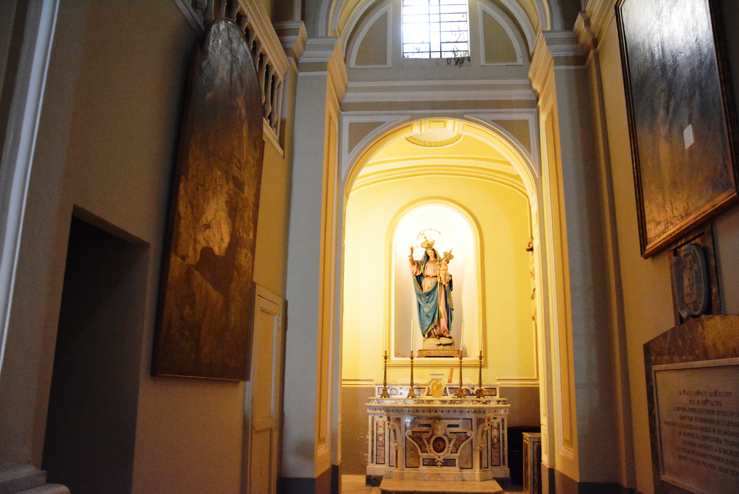 Cattedrale di Maria Santissima Assunta a Castellamma di Stabia